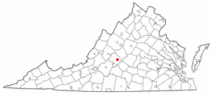 va maps